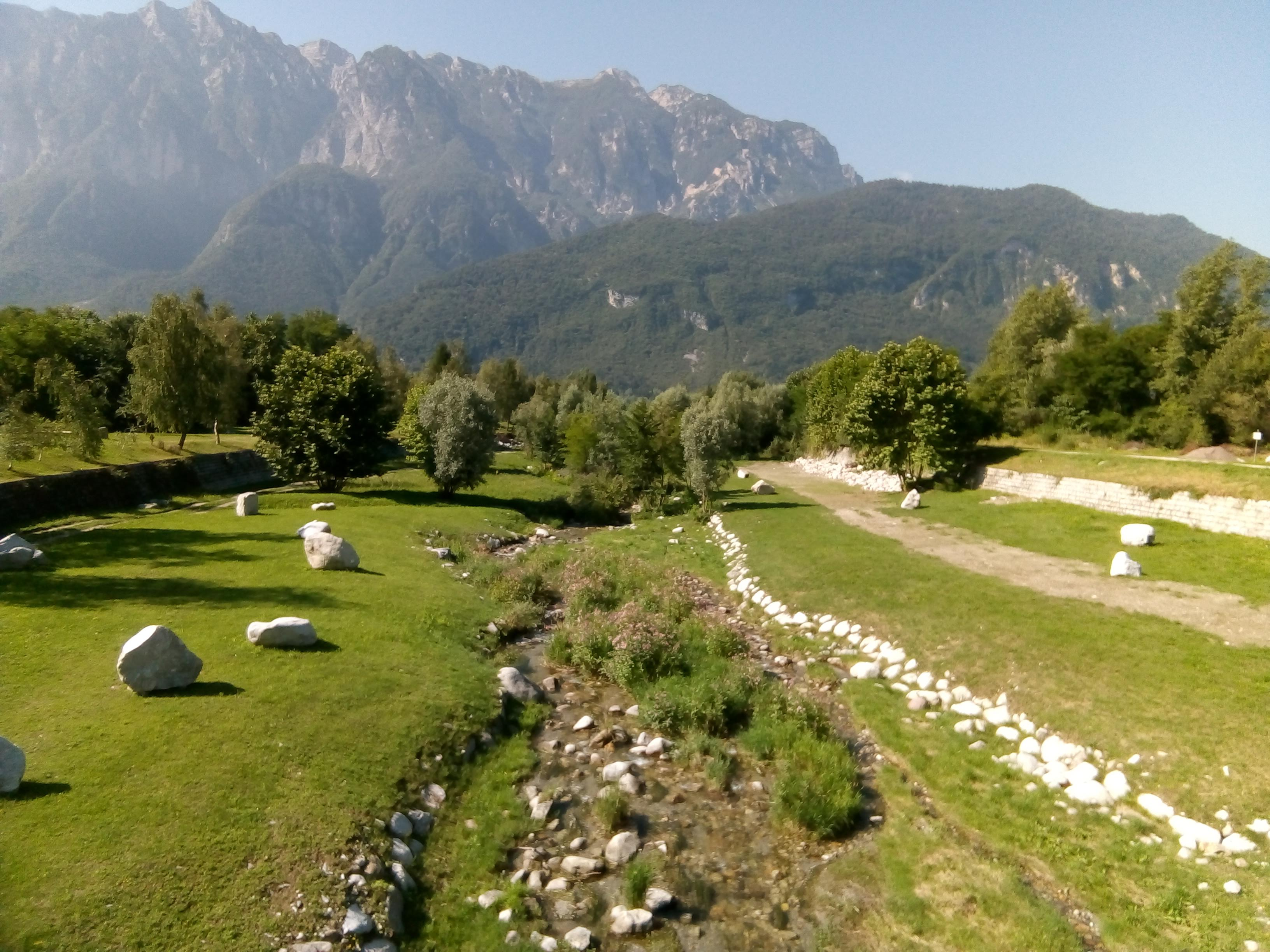 Torrente Chieppena, verso sud, dal ponte di Villa